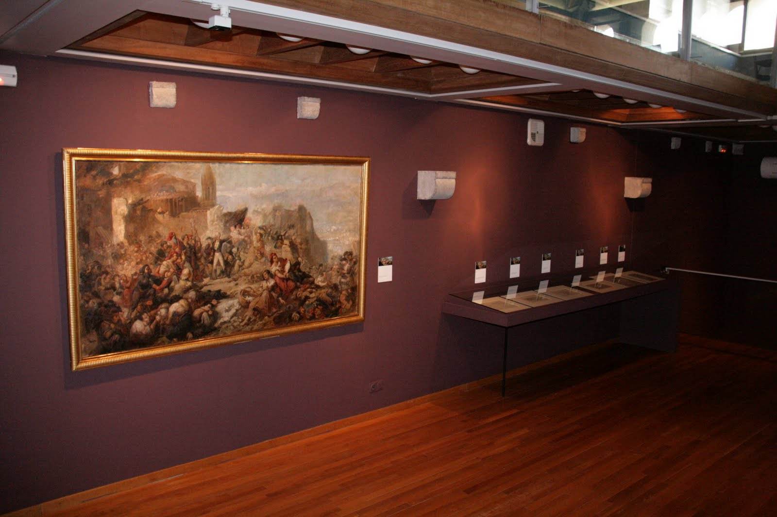 Exposició Anatomia d'un quadre, al voltant de l'obra El Gran dia de Girona al Museu d'Art de Girona